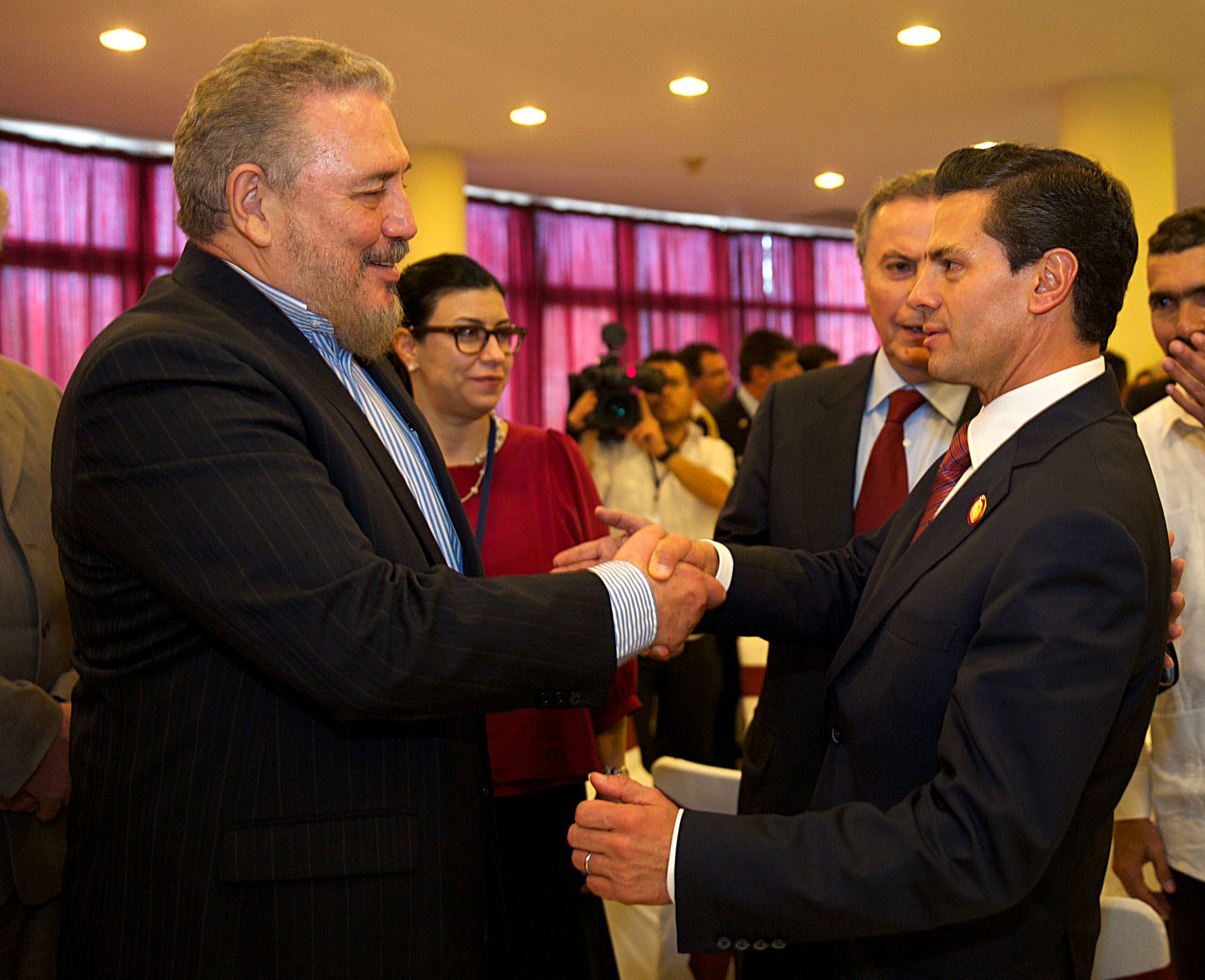 Saludo a Fidel Castro Díaz-Balart, durante el Almuerzo en honor del Excmo. Sr. José Mujica Cordano, Presidente de la República Oriental del Uruguay.